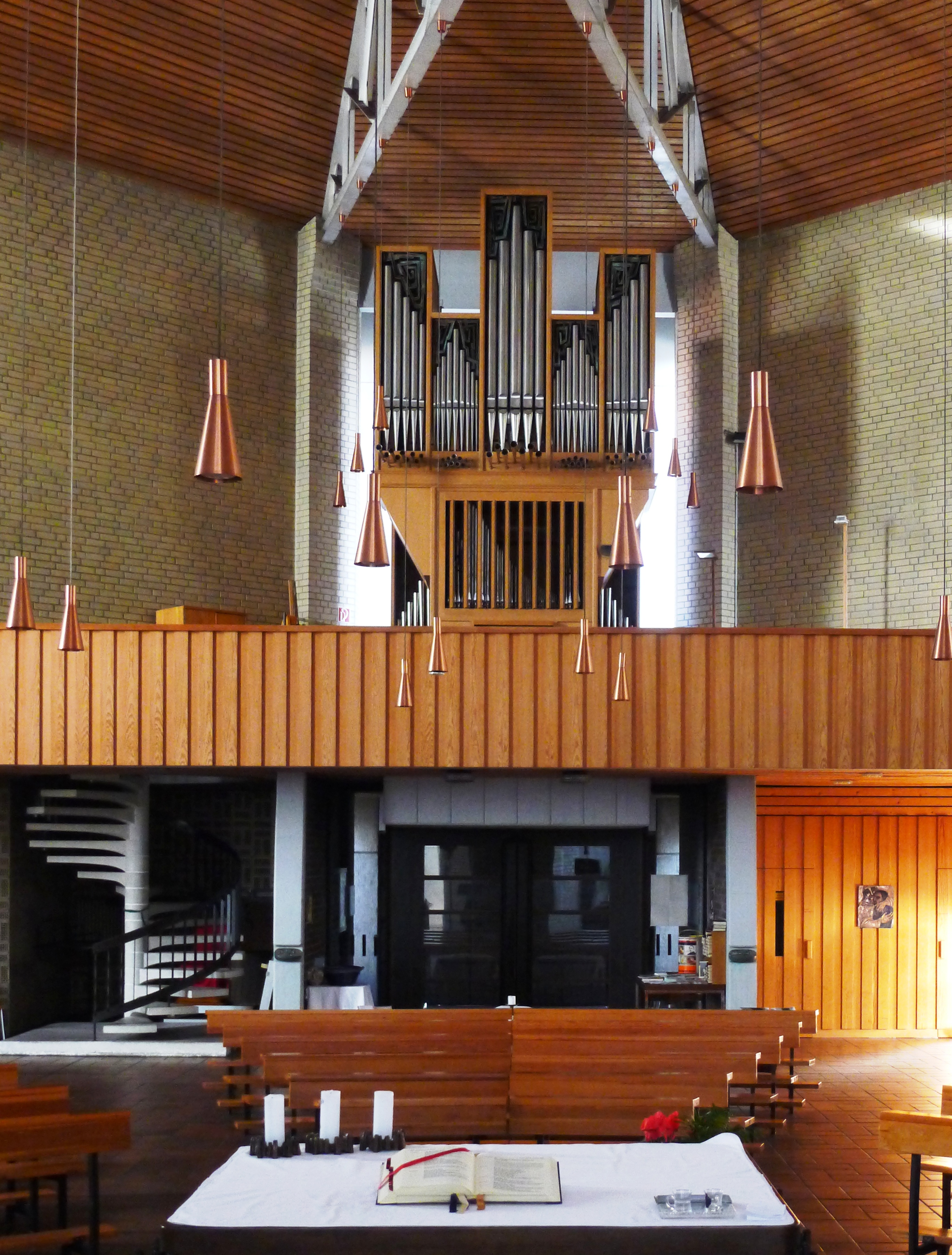 Blick vom Altarraum auf die Orgelempore über der Eingangshalle